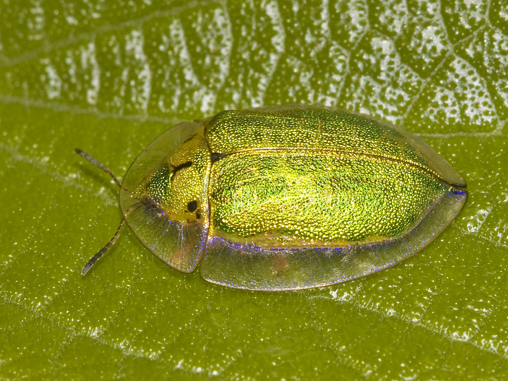 Hotel Taninul, San Luis Potosi, Mexico June 11